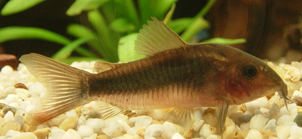 Ein Metallpanzerwels rastet